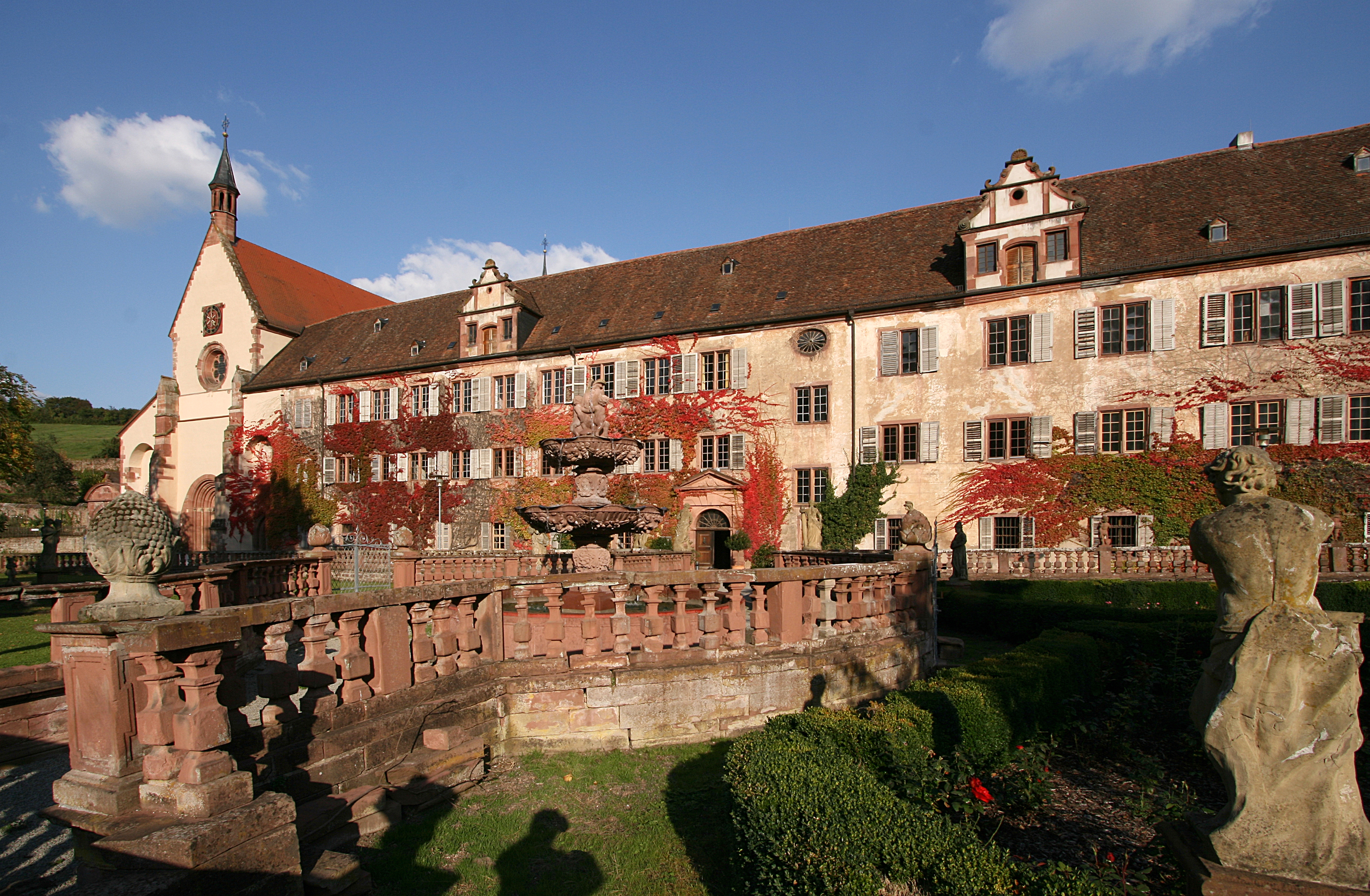 Kloster Bronnbach im Taubertal